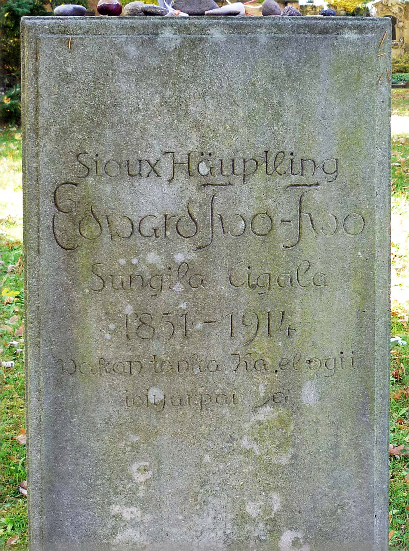 Grab des Sioux-Indianers Edward Two-Two (Grabinschrift)